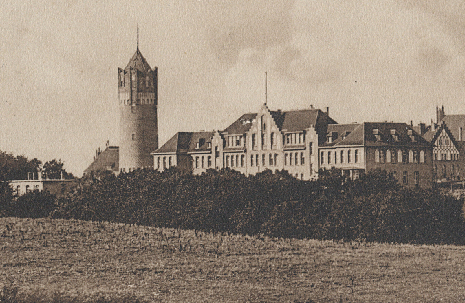 Mürwiker Burg um 1910, geerbt